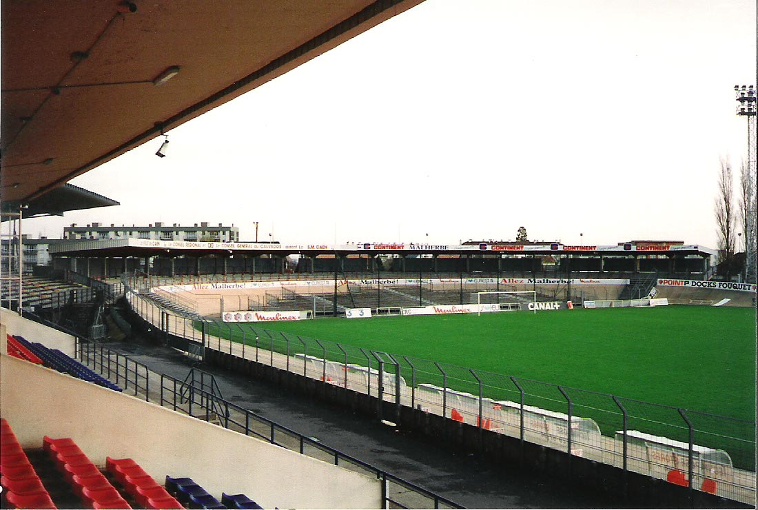 vue du stade de Venoix novembre 1992